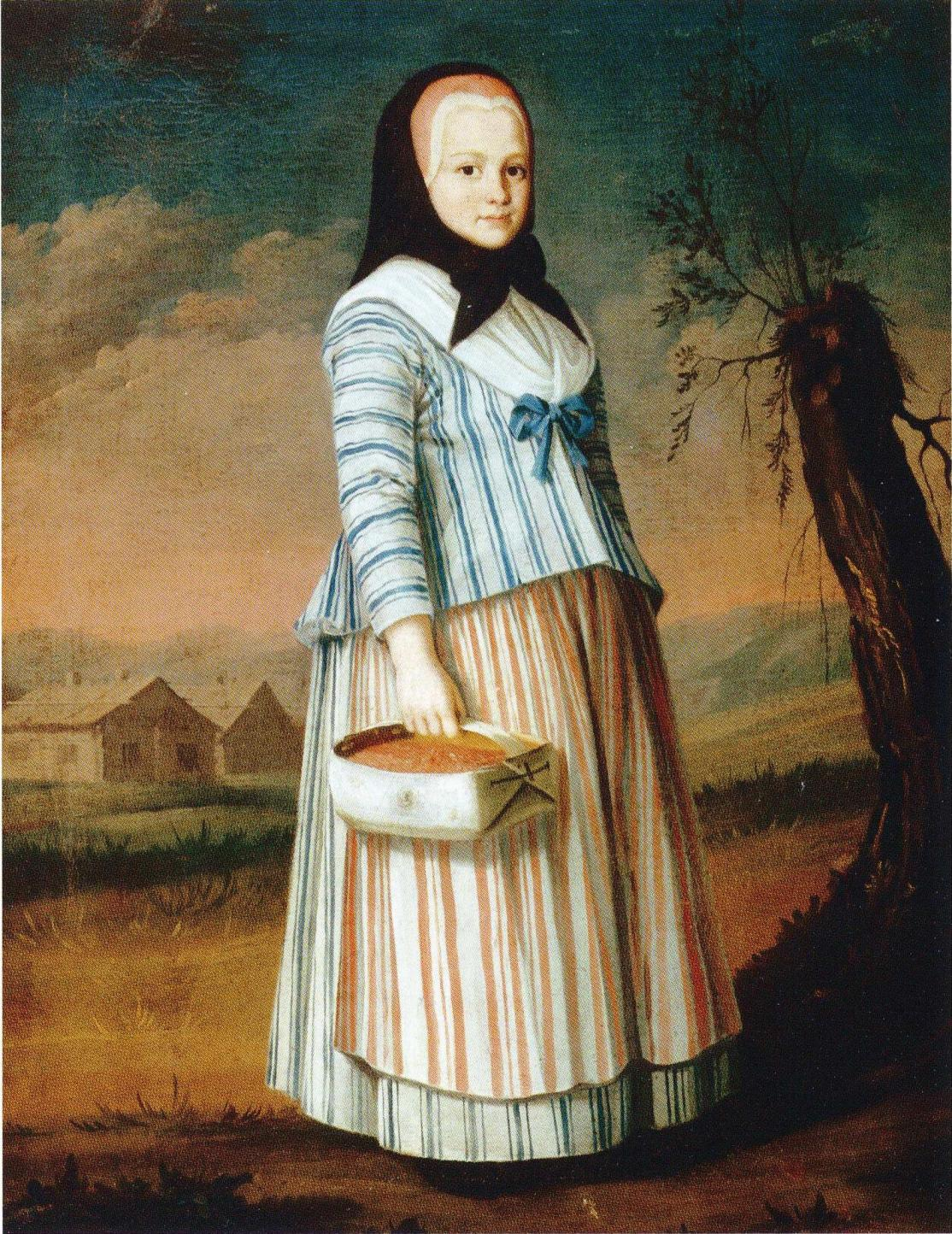 Mansikkatyttö. Maalauksen mallina oli aatelisperheen tytär Ulrika Charlotta Armfelt.